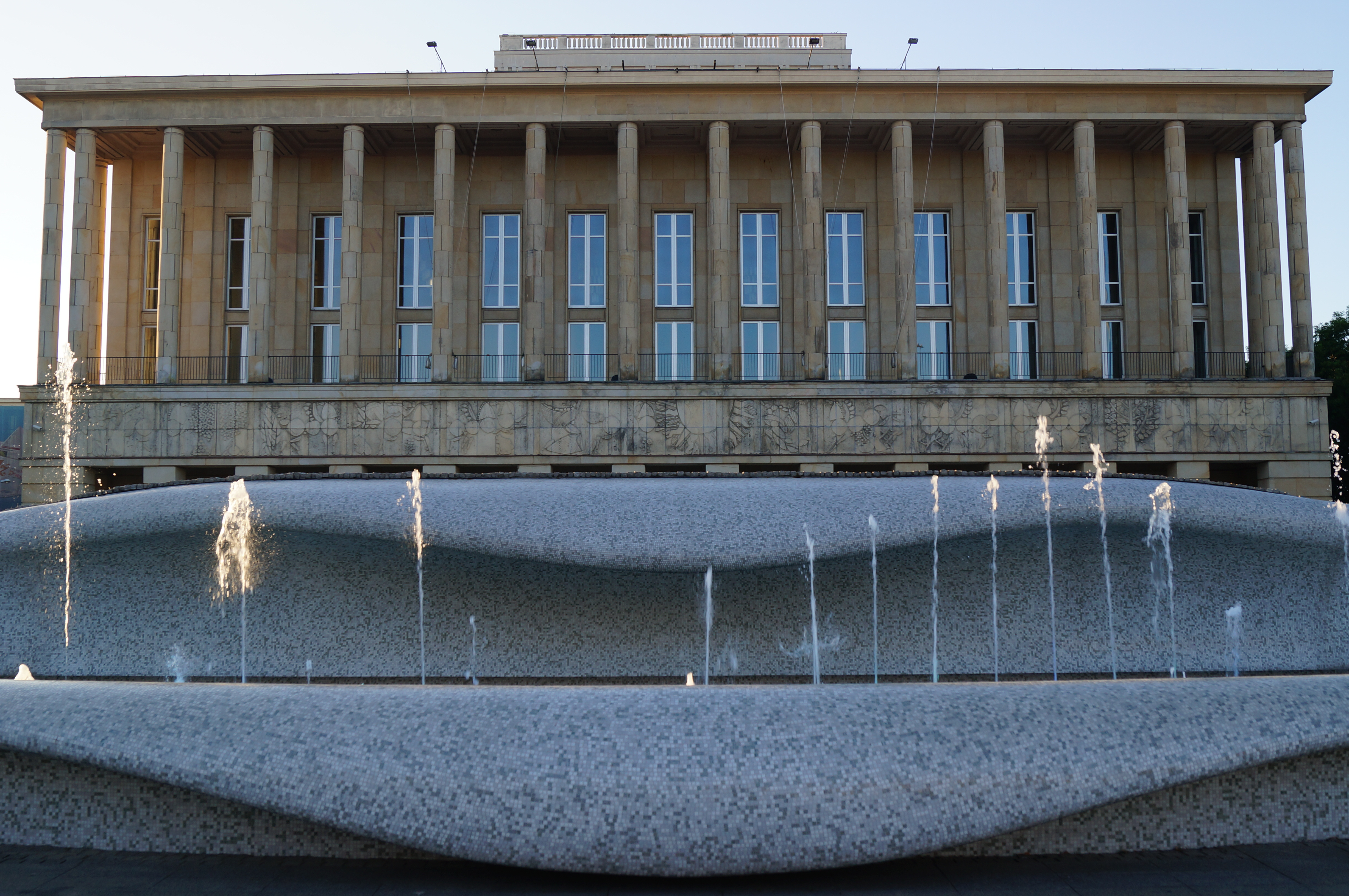 Łódź, Teatr Wielki - fontanna